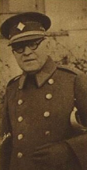 Vojta Mádlo (1872-1951), český dirigent, hobojista, hudební skladatel a pedagog